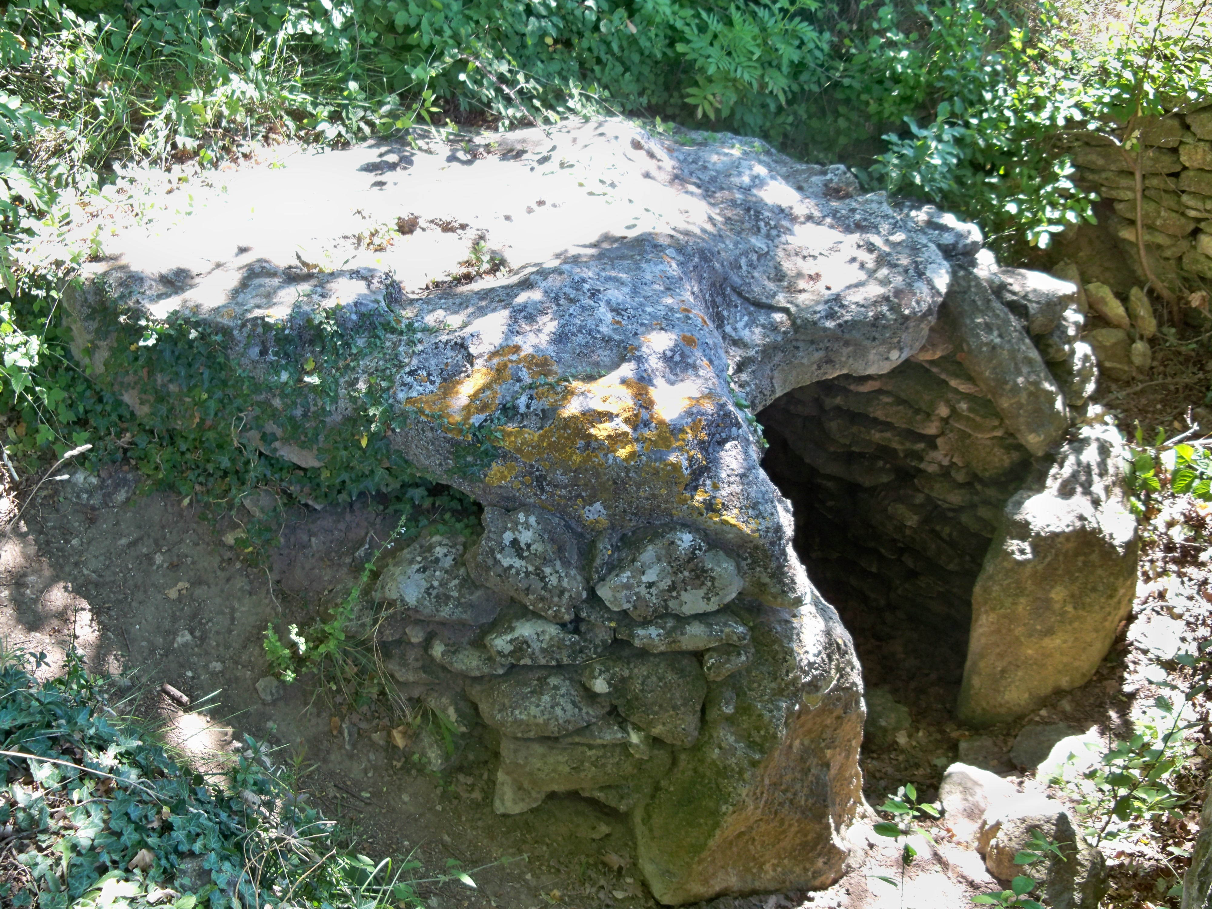 Dolmen de la Pitchoune, monument funéraire du néolithique sur la commune de Ménerbes, Vaucluse, France